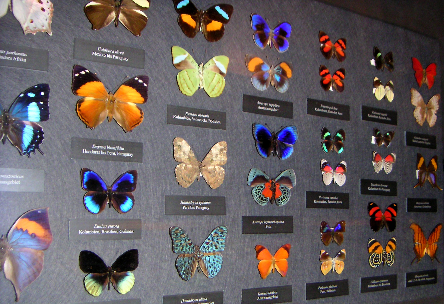 Summary Schmetterlingsammlung im Naturhistorischen Museum Wien, selbst fotografiert